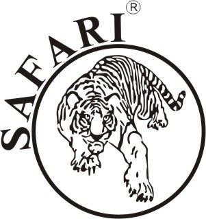 логотип фирмы